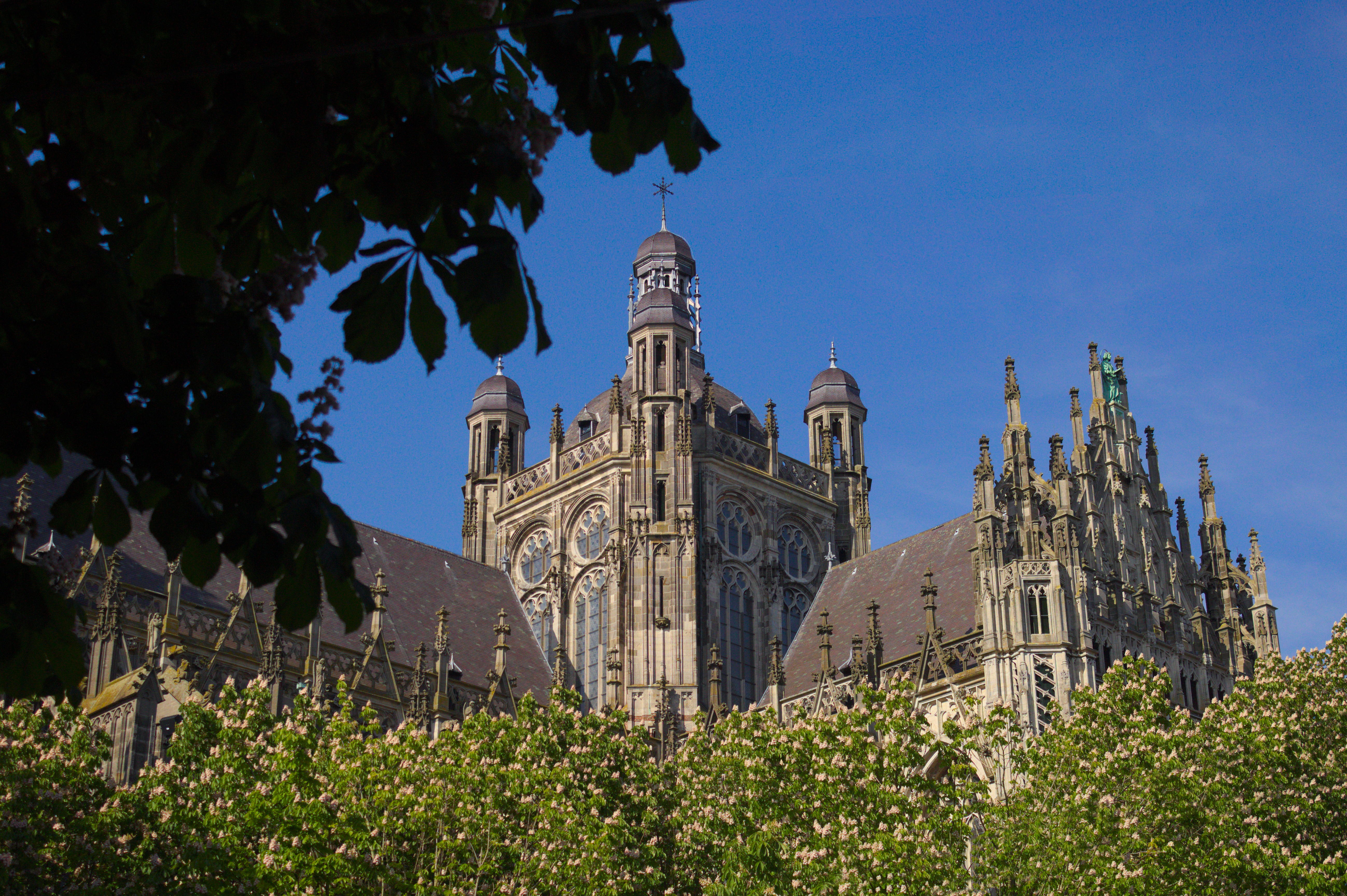 Den Bosch: Sint Janskathedraal